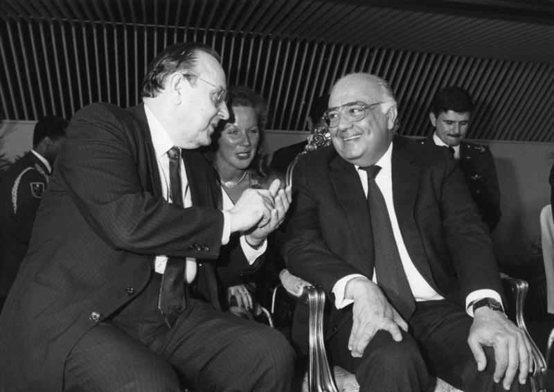 Caracas, 8. April 1987 Am 7. April 1987 startete der Bundesminister des Auswärtigen, Hans-Dietrich Genscher, zu einer Reise nach Mittelamerika. Vom 7. bis 9.4. besuchte er Venezuela und vom 9. bis 13.4. die Republik Costa Rica. Letzte Station seiner Reise war El Salvador. Am 14. April kehrte Bundesaußenminister Genscher nach Bonn zurück. Einweihung des Kulturinstituts der Asociacion Cultural Humboldt Bundesaußenminister Genscher (li.) im Gespräch mit dem venezolanischen Präsidenten, Dr. Jaime Lusinchi.